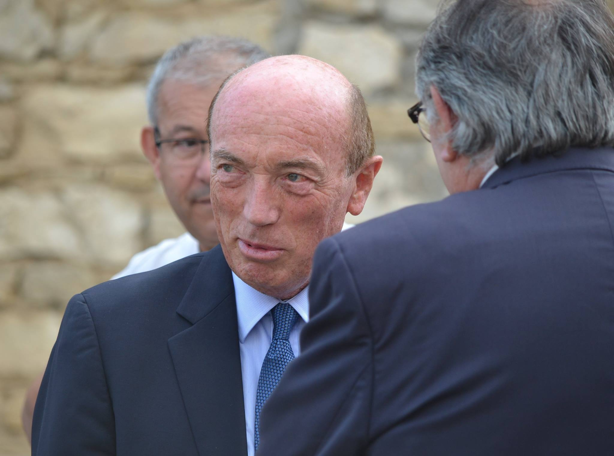 Député de L'Isère